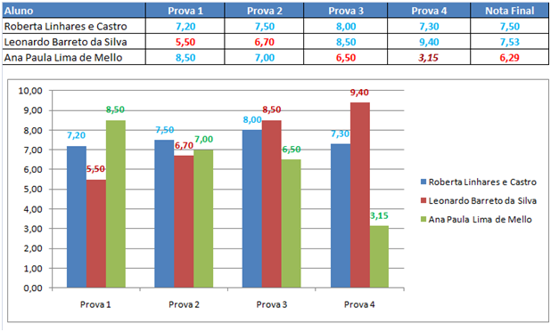 O Auxílio da informática como recurso pedagógico na educação. O Gráfico permite ao professor visualizar a curva de crescimento de seus alunos.